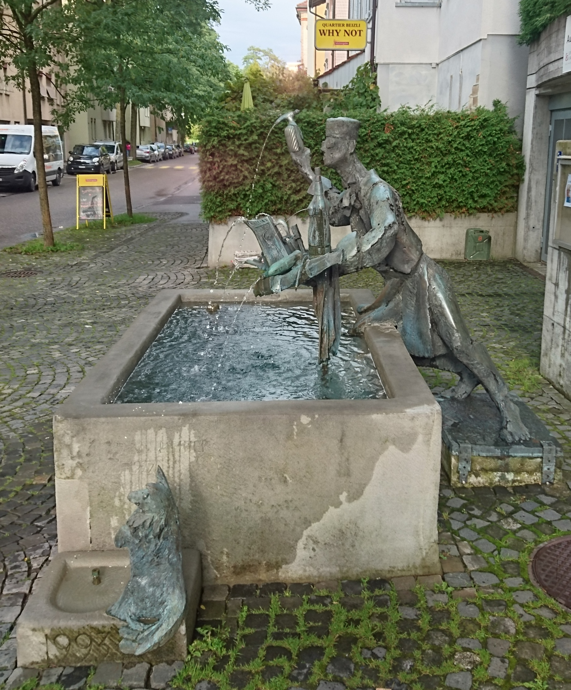 Der Johann-Linder-Brunnen, aus dem jeweils an der Fasnacht an einem Morgen Glühwein ausgeschenkt wird